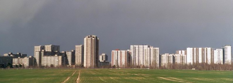 Gropiusstadt in Berlin, Ansicht von Süden